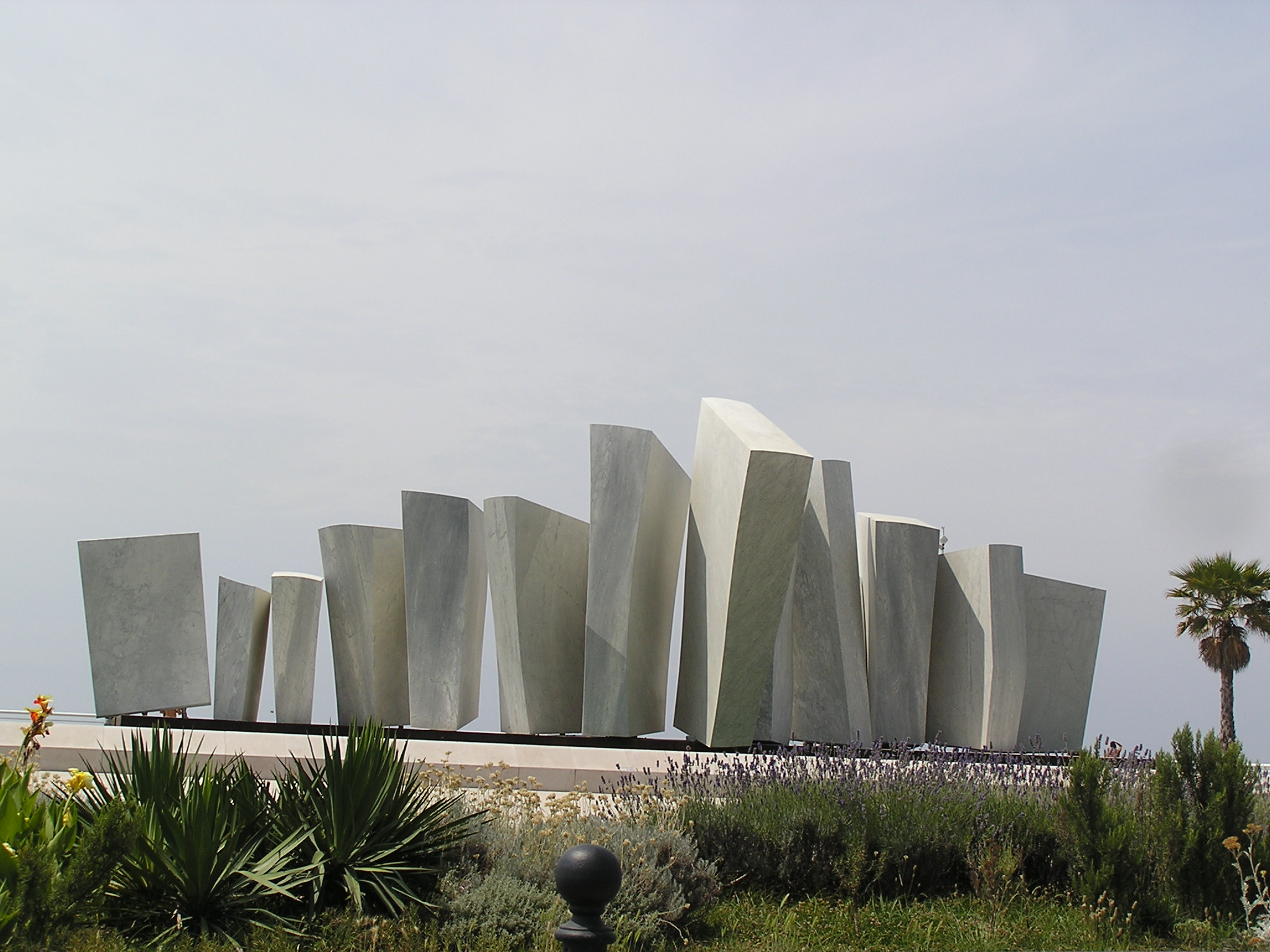 Il principale monumento di Marina di Massa.